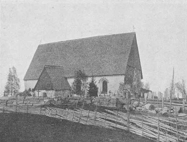 Storkyro kyrka.